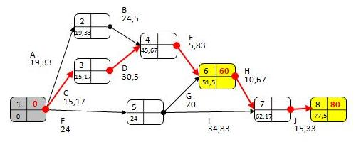 PERT-sivun kuvitusta, verkko 3.